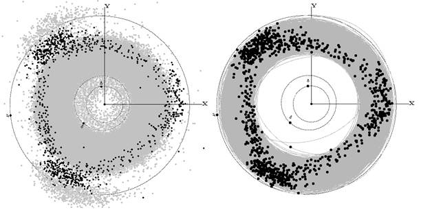 Слева - треугольник Гильд на фоне всех известных астероидов. Справа - положения Гильд на фоне их орбит.